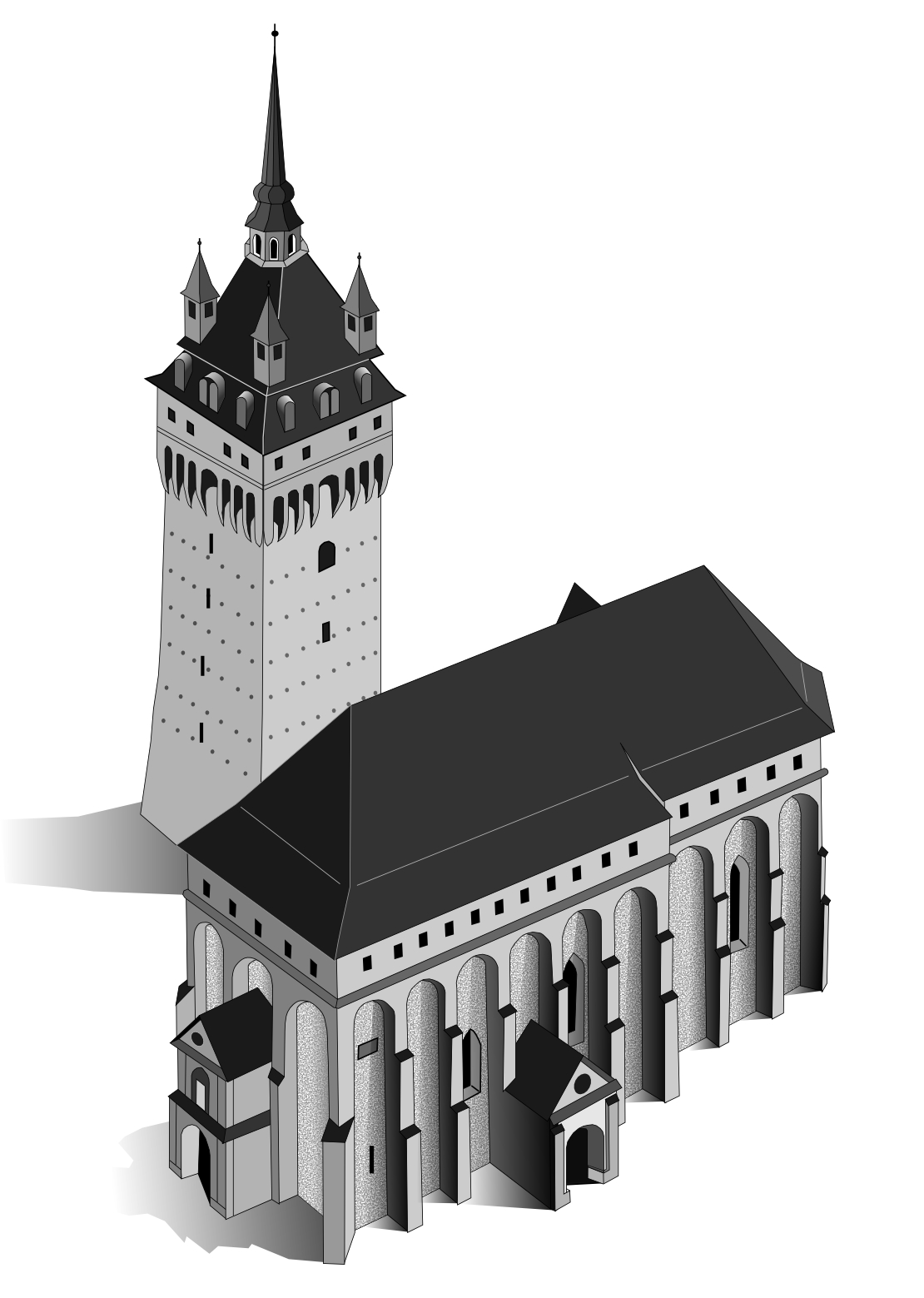 Macheta pentru Biserica fortificata din Saschiz.